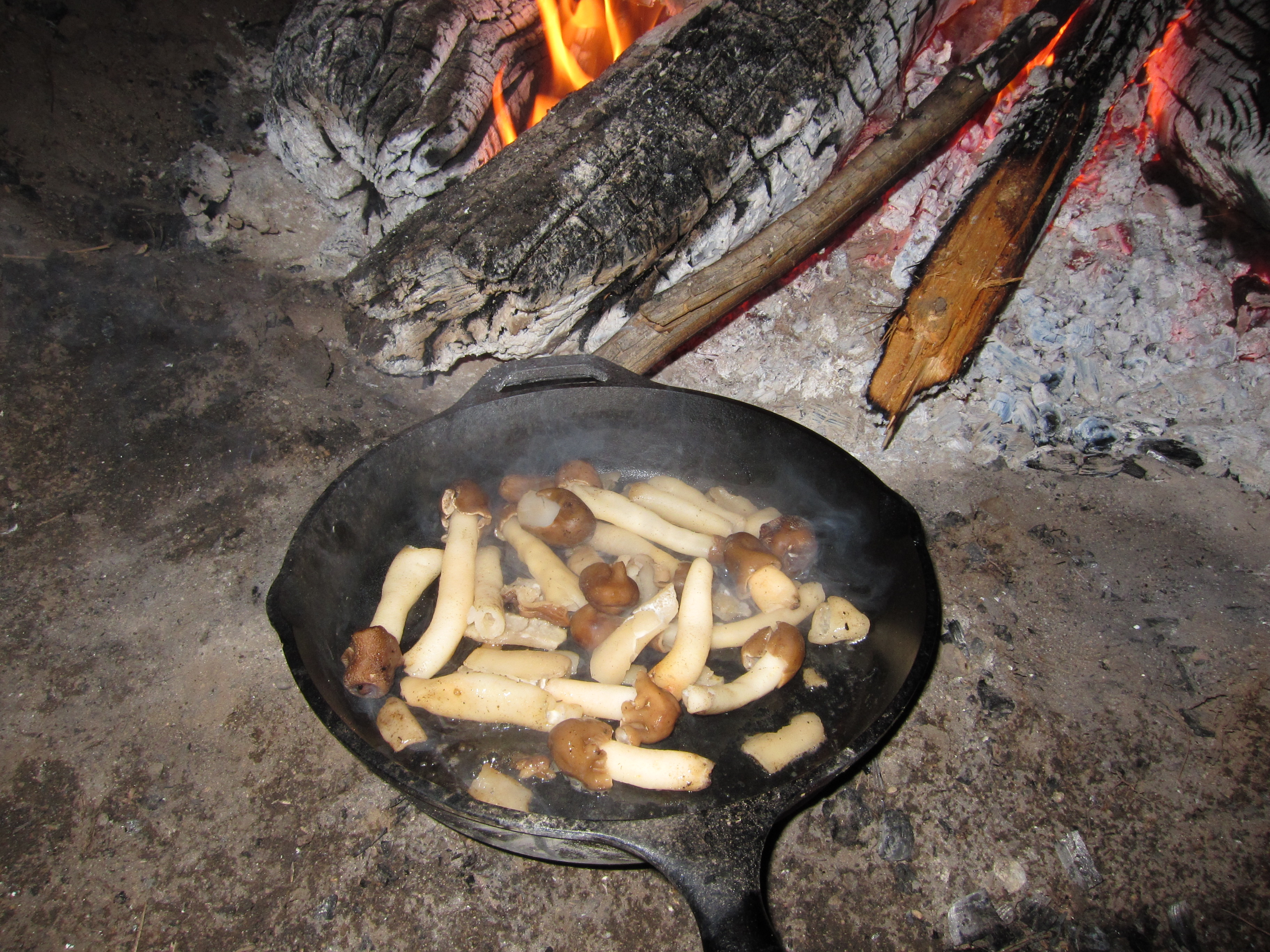 Verpa conica